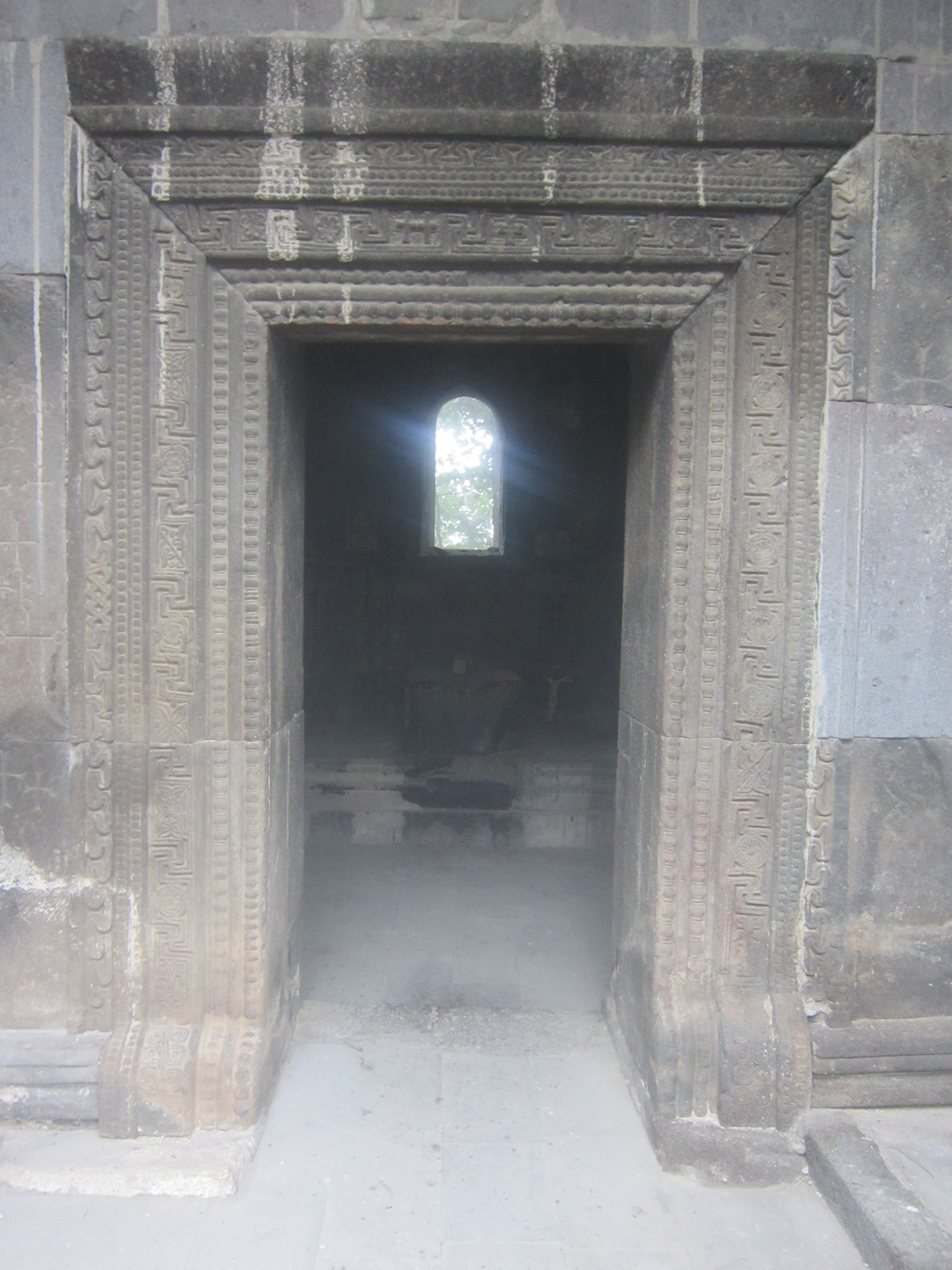 Վանական համալիր Բղենո Նորավանք 21/8.3